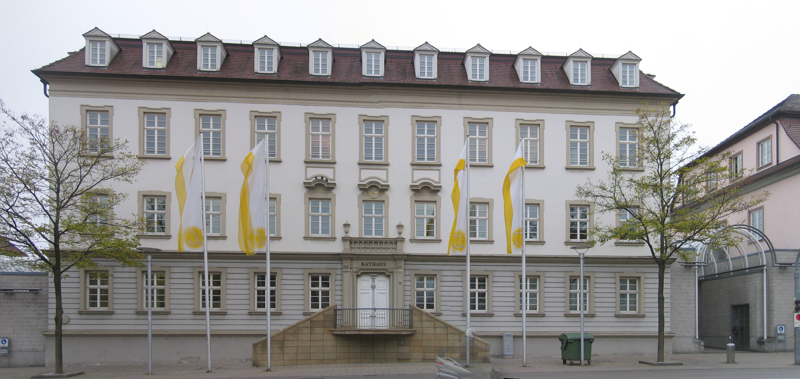 Wilhelmstraße 11, Ludwigsburg